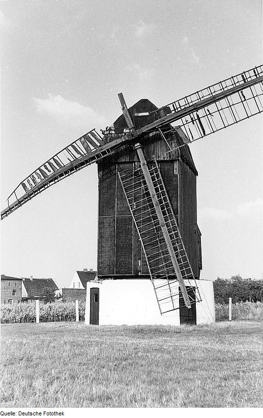 Original image description from the Deutsche Fotothek Pömmelte. Bockmühle, Baujahr 1860